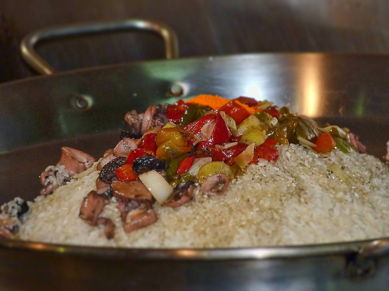 Preparado para arroz de marisco...el marisco, luego. El final fue ya en el plato...y no estaba yo para fotos...se enfriaba... Fue en la Fiesta del marisco de O Grove, hace dos días.